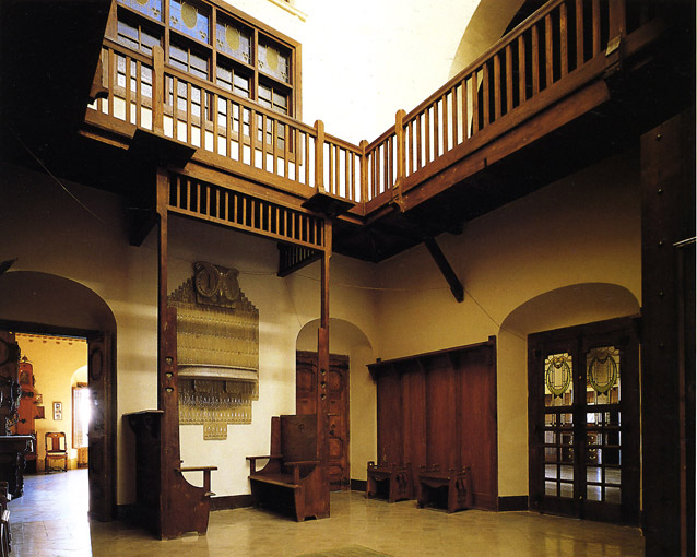 Reforma d'una masia del S.XVIII propietat de Tomàs Cendra.